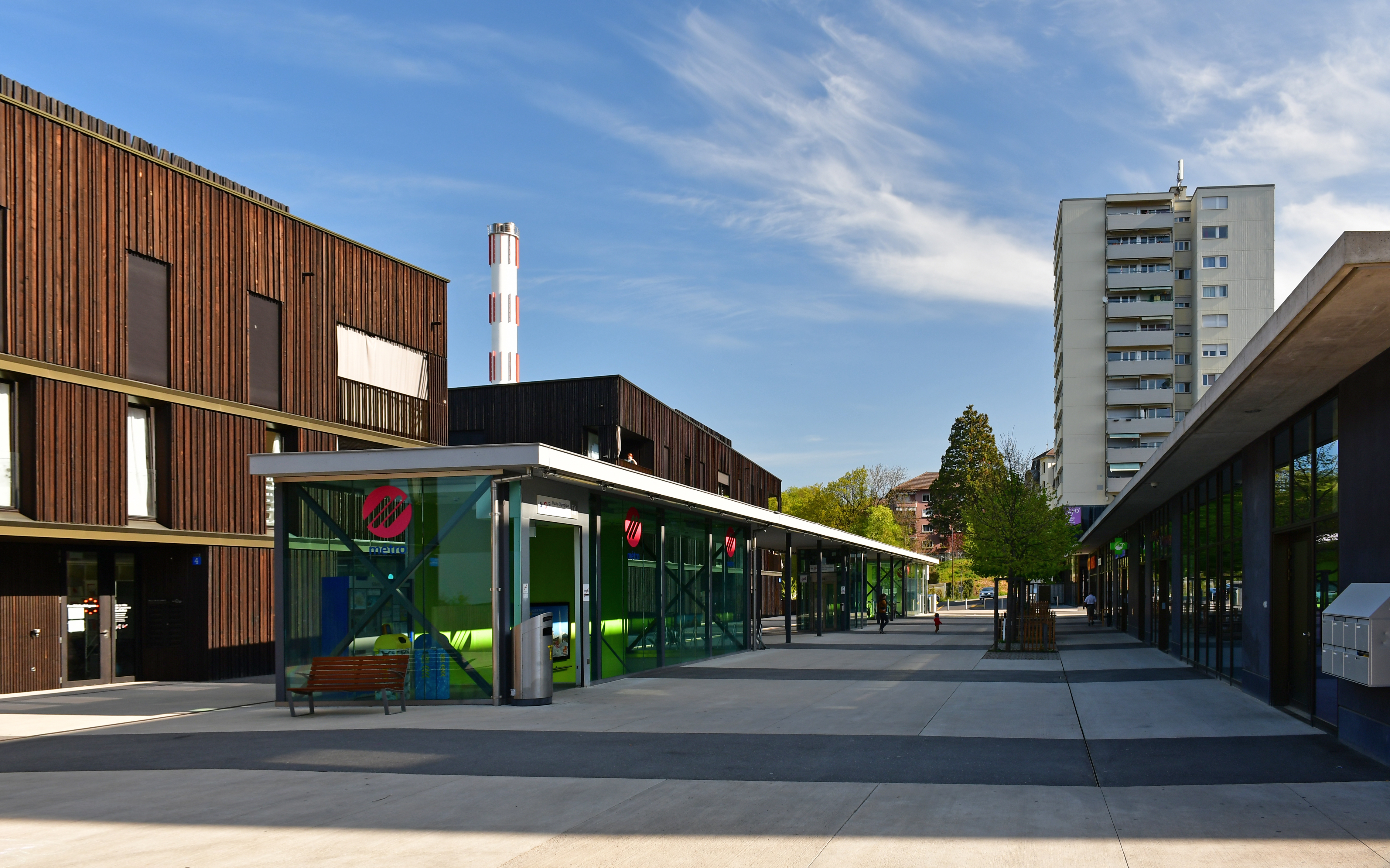 La station du métro M2 de la place de la Sallaz de Lausanne (Suisse).